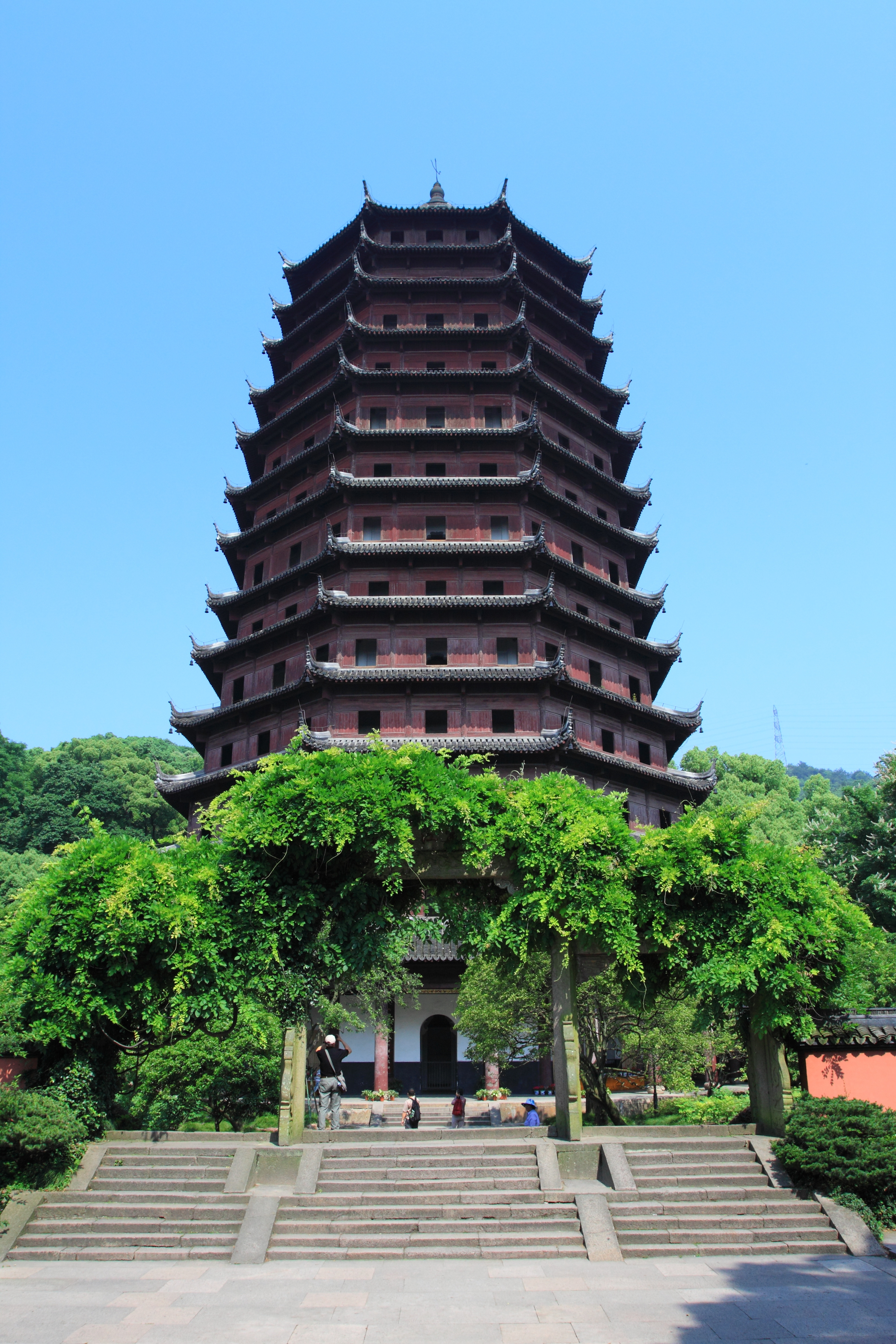 六和塔，位于中国浙江省杭州市。